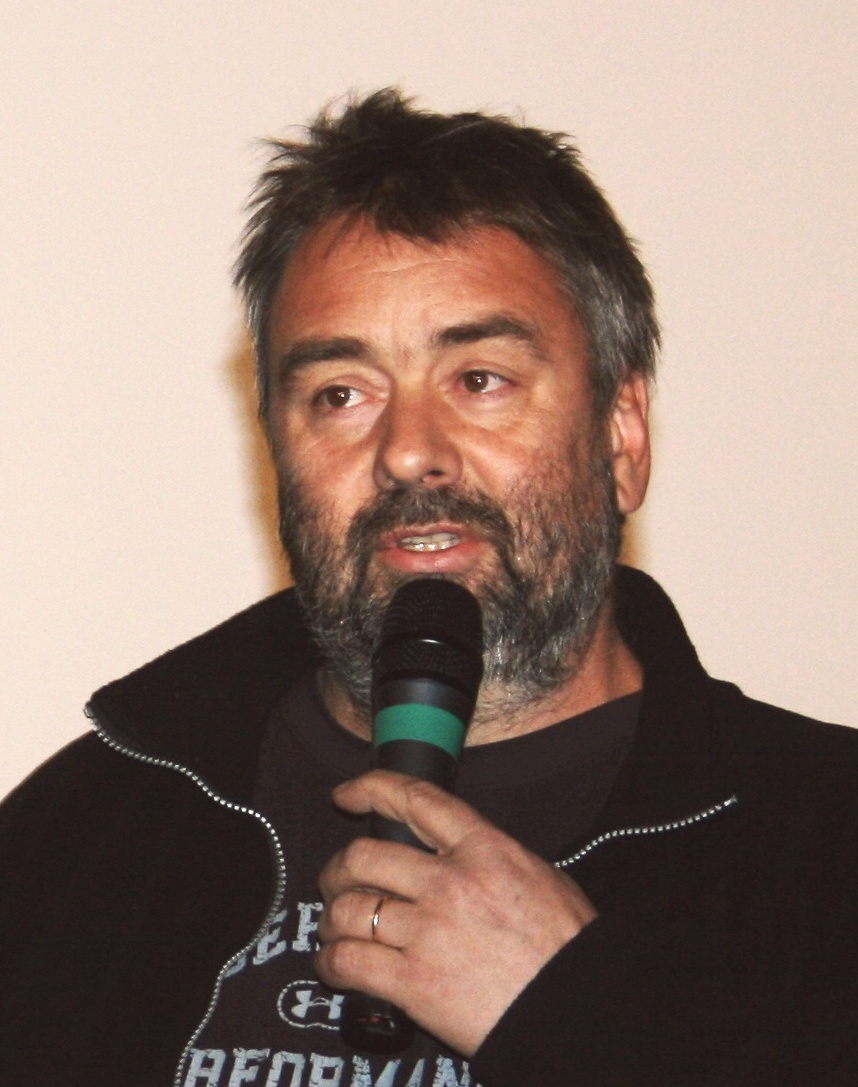 Luc Besson à l'avant-première de Taken diffusée à l'UGC Ciné Cité Les Halles, à Paris.